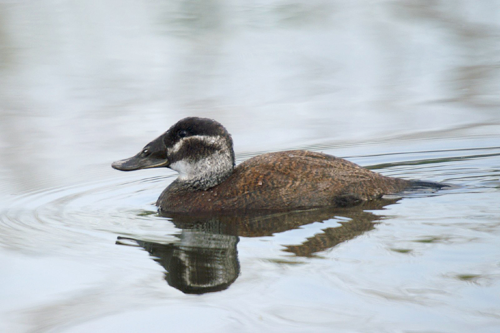 Malvasía cabeciblanca - Ànec cap-blanc - White-headed Duck - Oxyura leucocephala, female, Clot-de-Galvany, Alicante, España